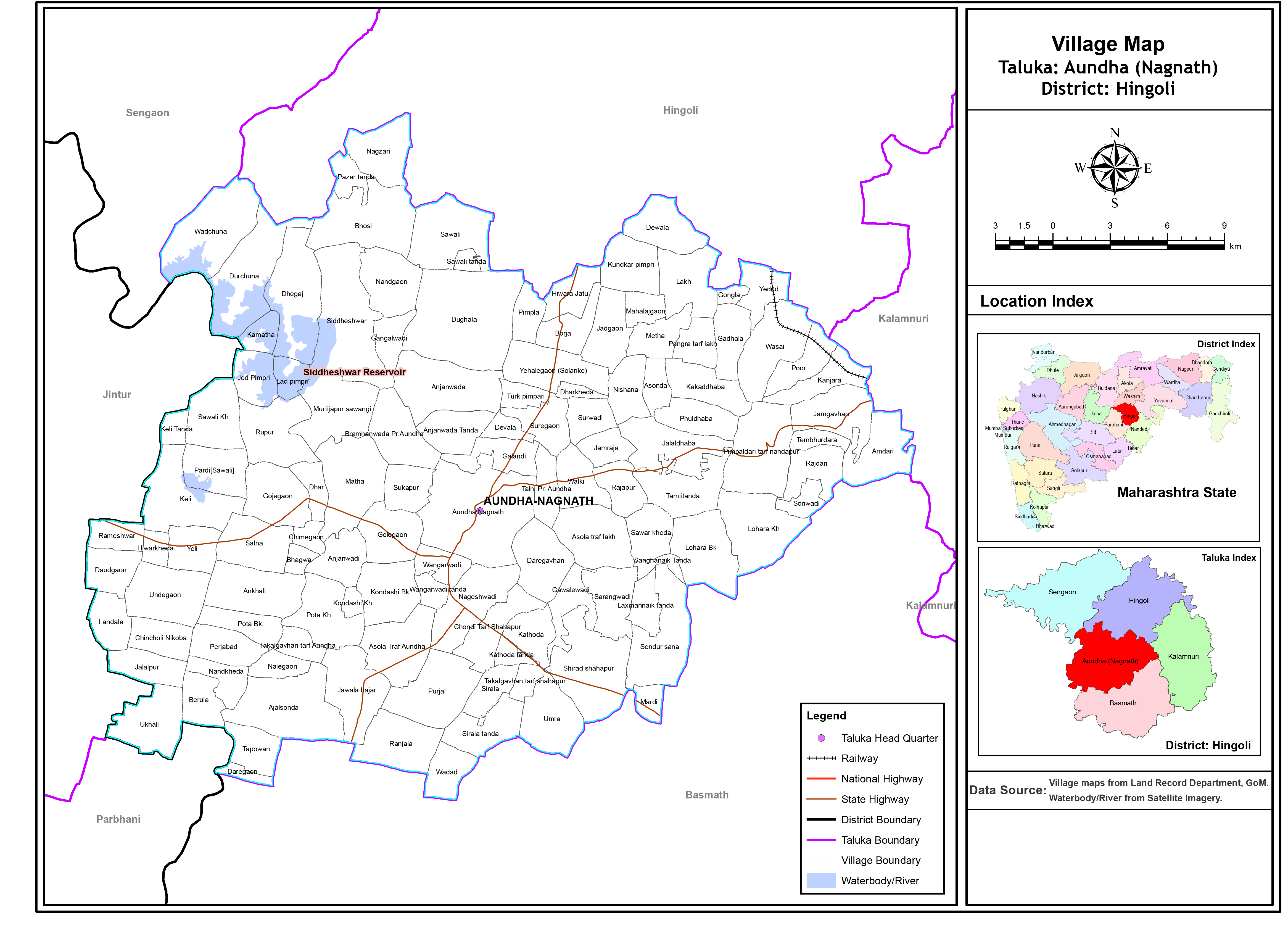 औंढा नागनाथ तालुक्याचा नकाशा